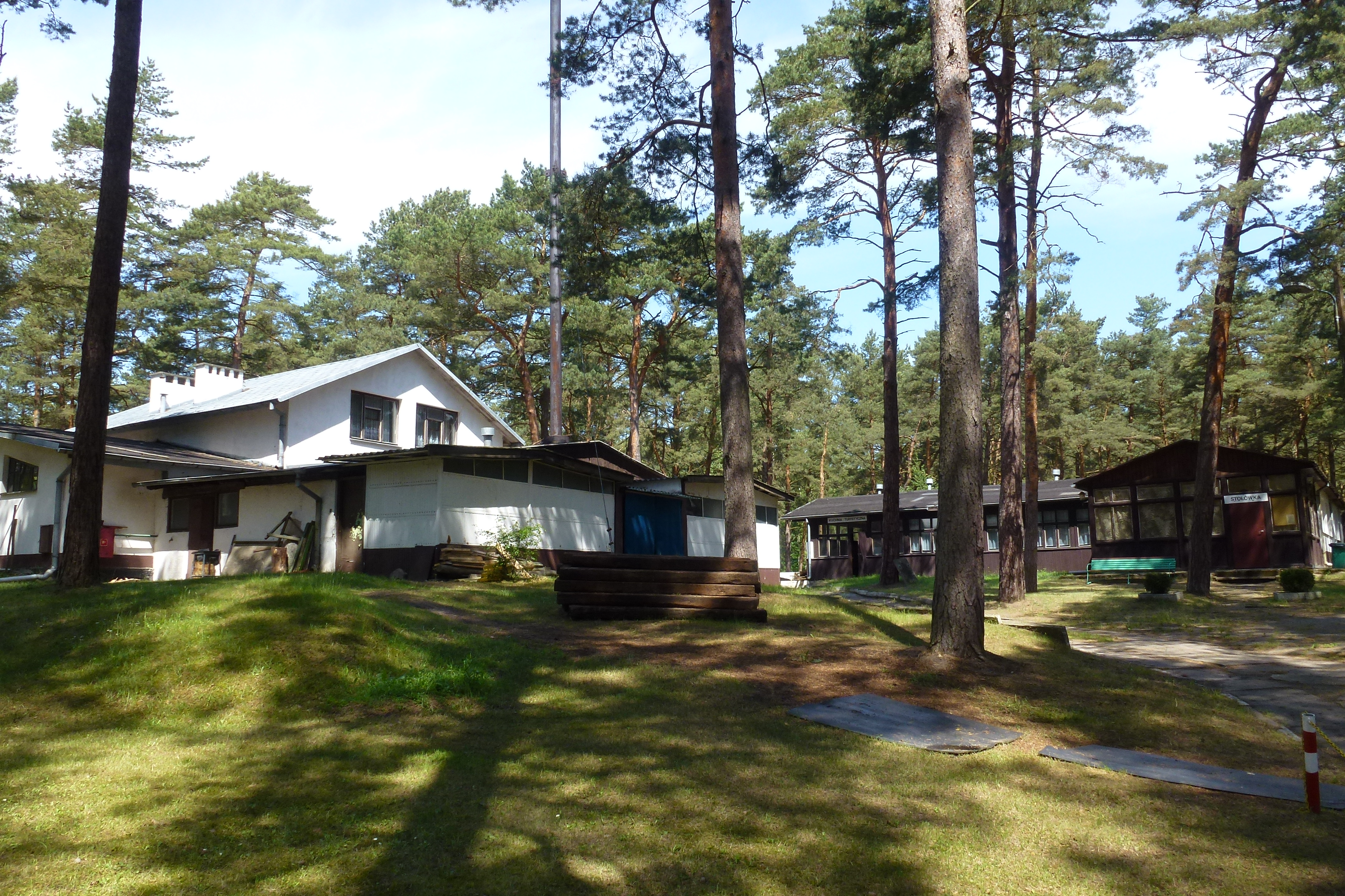 Gdańsk Orle - Kemping nr 69 "Orlinek"